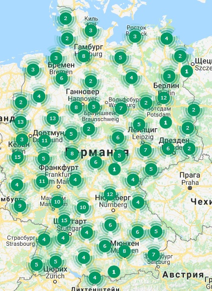 Центры поддержки юных футболистов